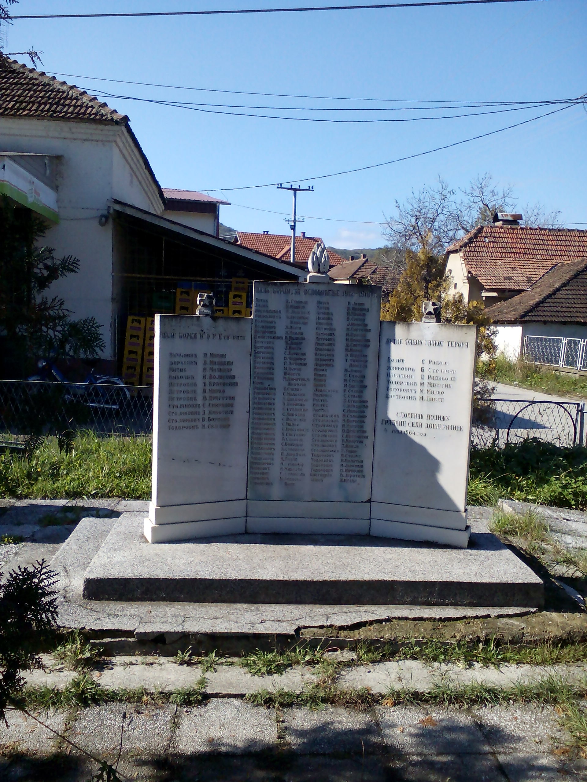 Споменик погинулим у ратовима у центру Доњег Раника